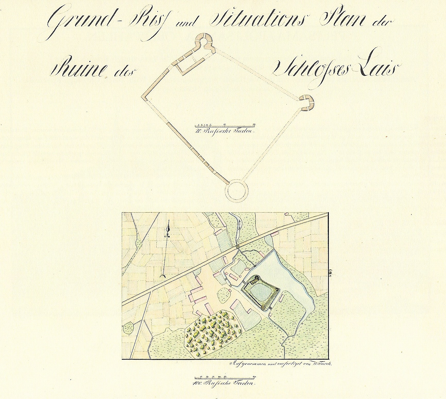 Laiuse linnuse asendiplaan. Paulucci album